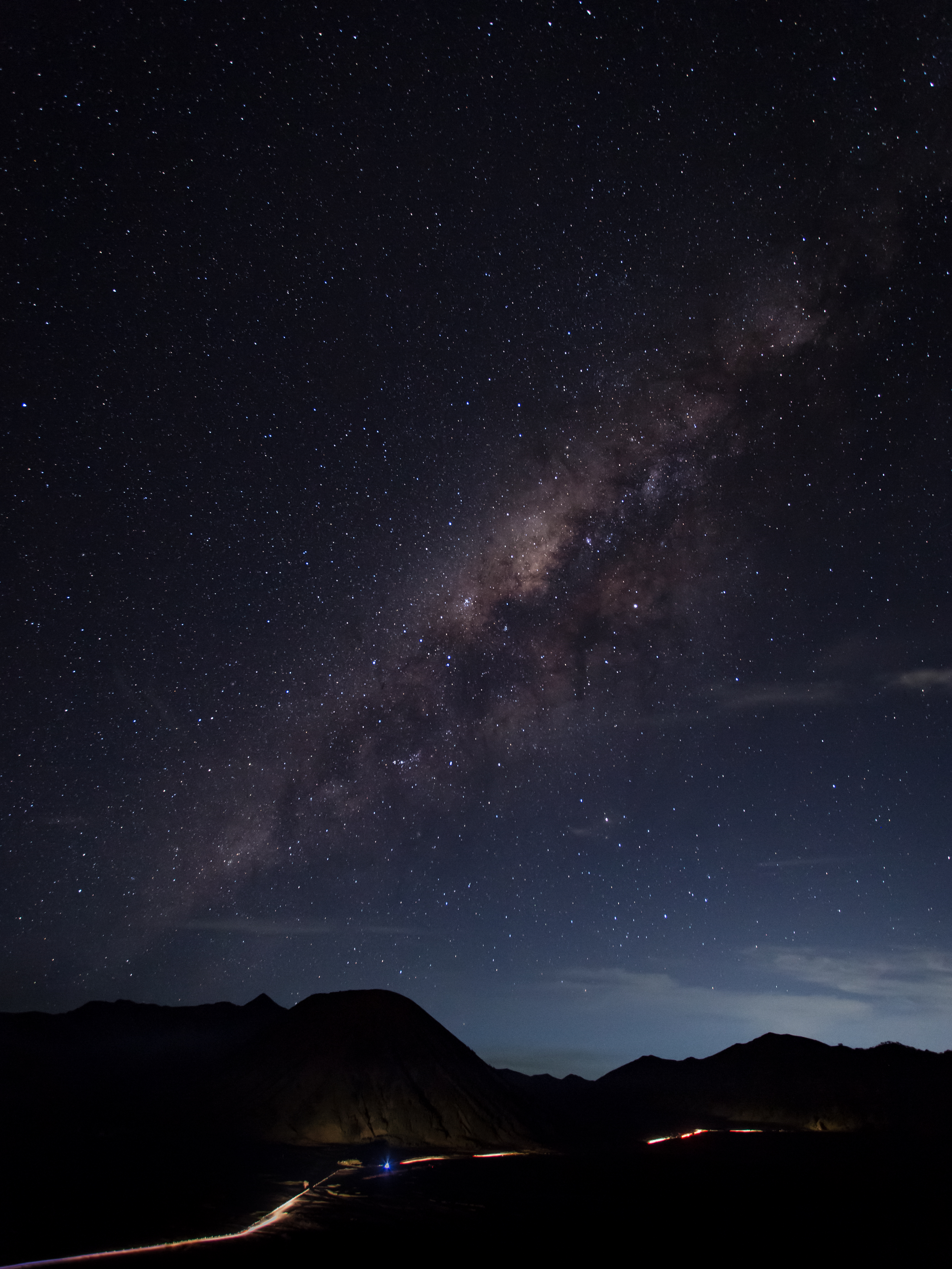 Pada bulan-bulan tertentu Milky Way dapat terlihat dengan jelas diatas Bromo, foto ini diambil ketika jeep-jeep sedang naik ke atas Bromo maka terlihat garis-garis cahaya di kaki gunung.